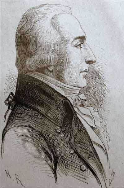 Portrait de Pierre-Roger Ducos